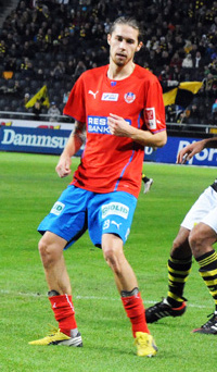 Daniel Nordmark